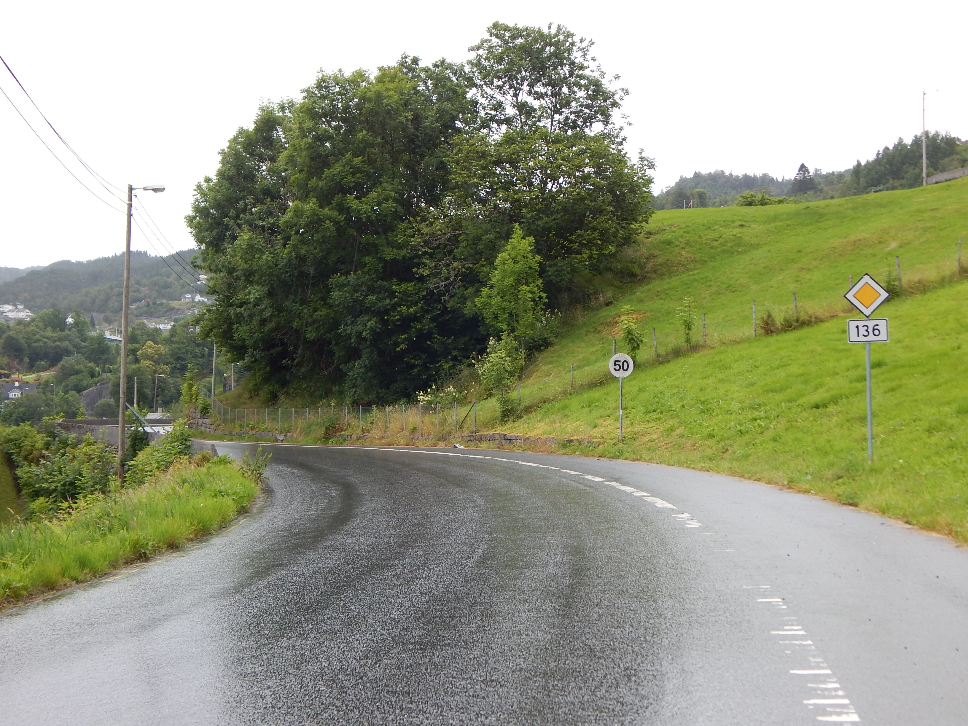 Tyssevegen (fylkesvei 136) i Samnanger kommune